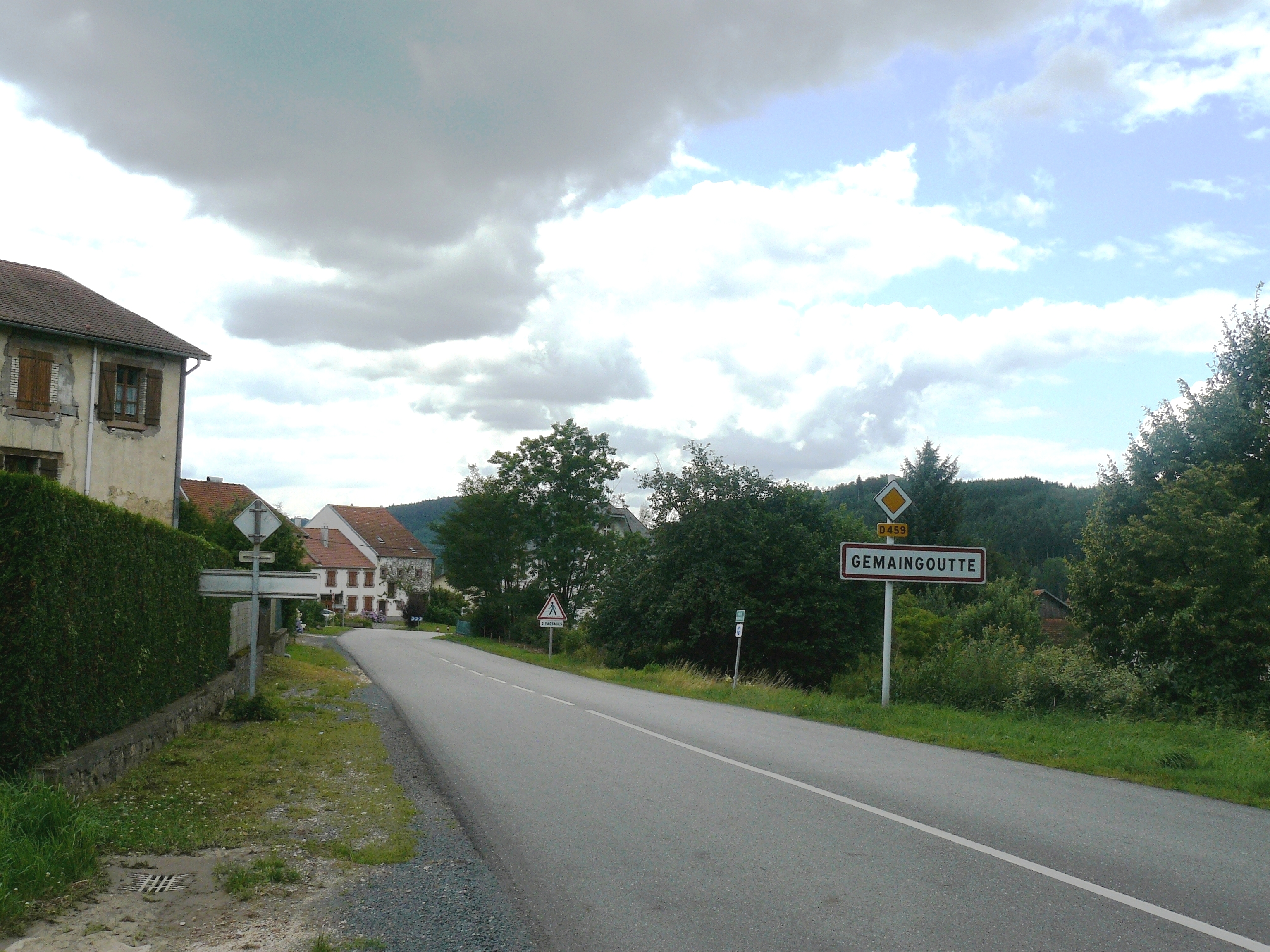 Entrée du village de Gemaingoutte